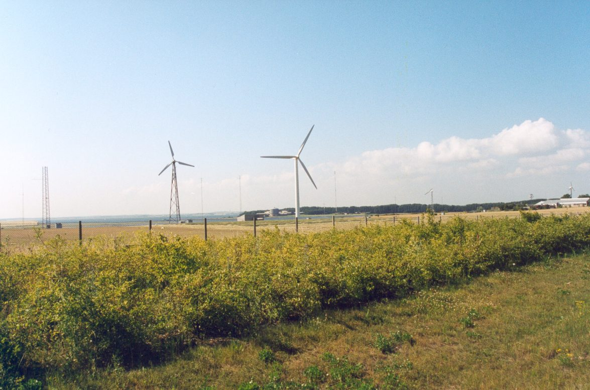 Le Laboratoire national Risø avec ses éoliennes au premier plan et son réacteur nucléaire en fond.